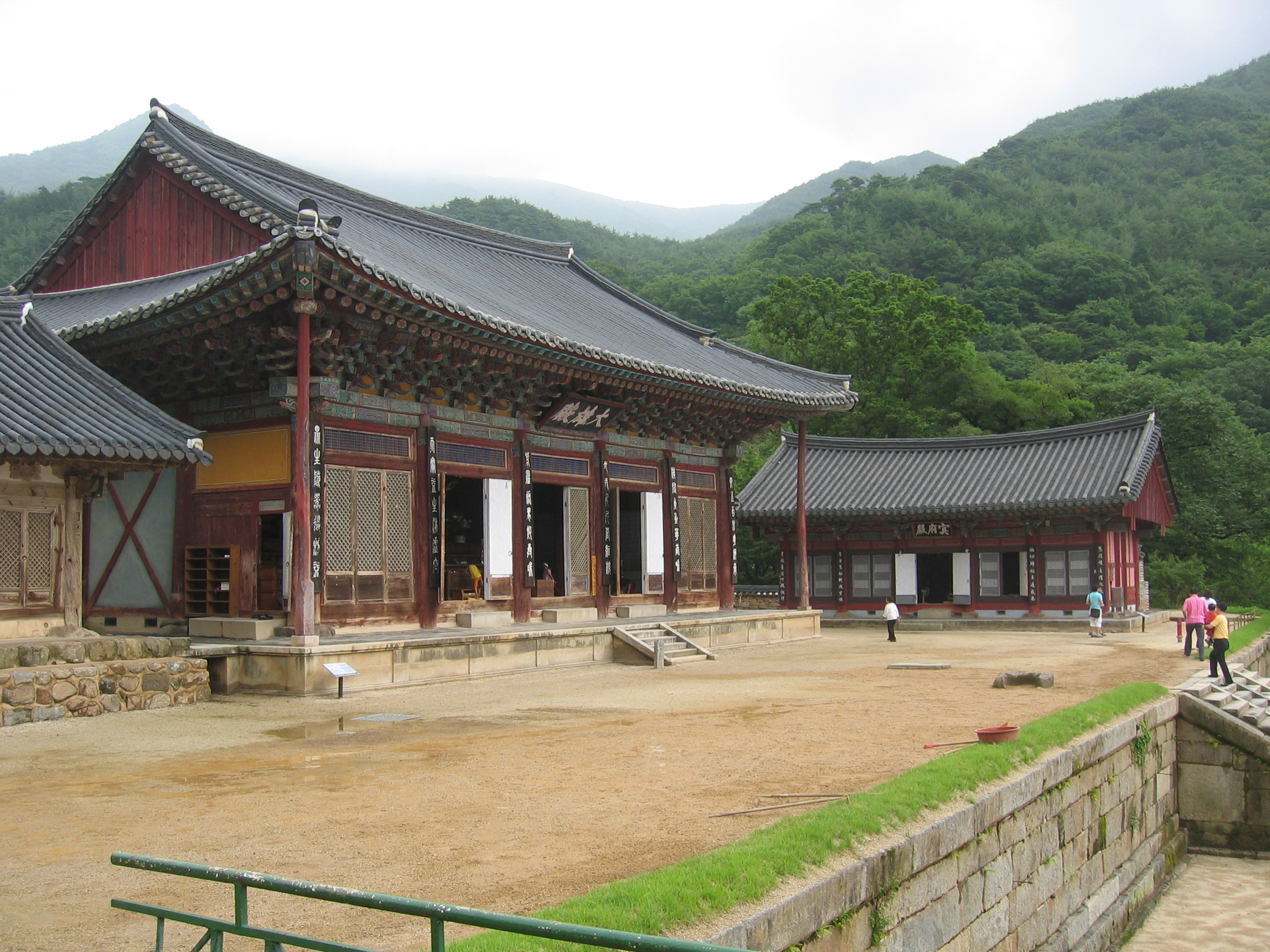 2006년 대한민국 지리산에 위치한 화엄사 Hwaeomsa, one of the Buddhist temples in Jirisan (Mt.Jiri), South Korea, 2006